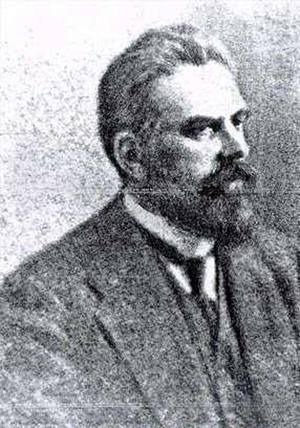 イパチェフ館の持ち主、ニコライ・イパチェフの写真（1918年以前）